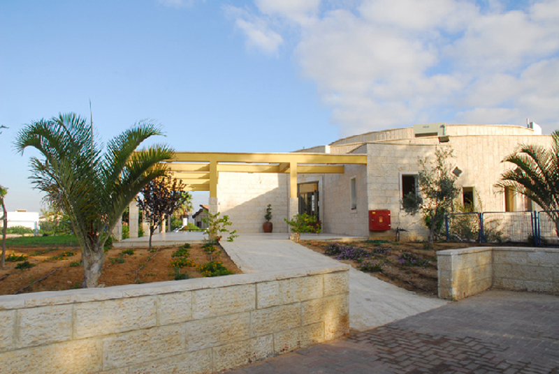 בית הכנסת "אחדות ישראל" בשכונה הצפונית במיתר